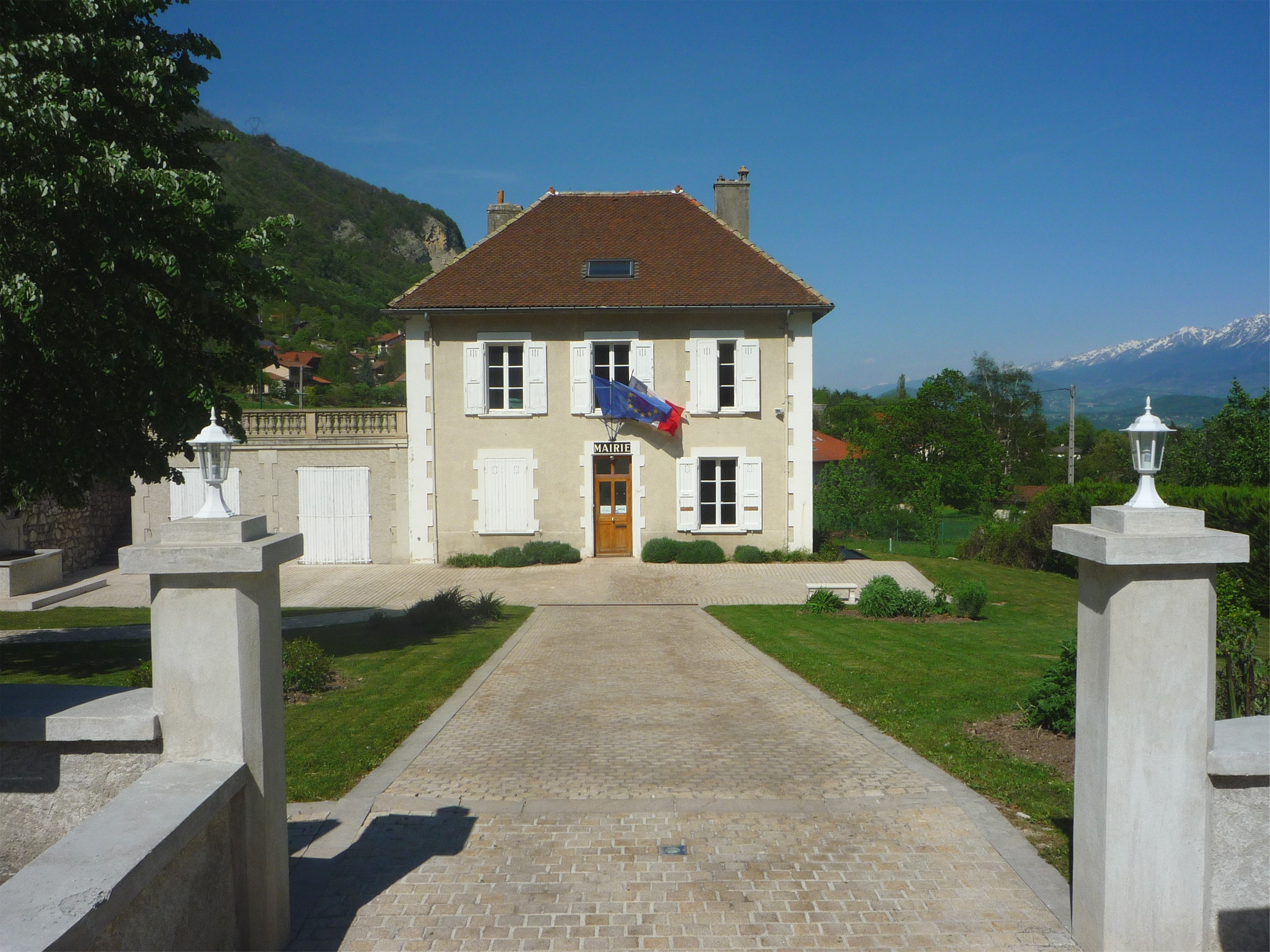 Mairie de Saint-Paul-de-Varces (Isère)